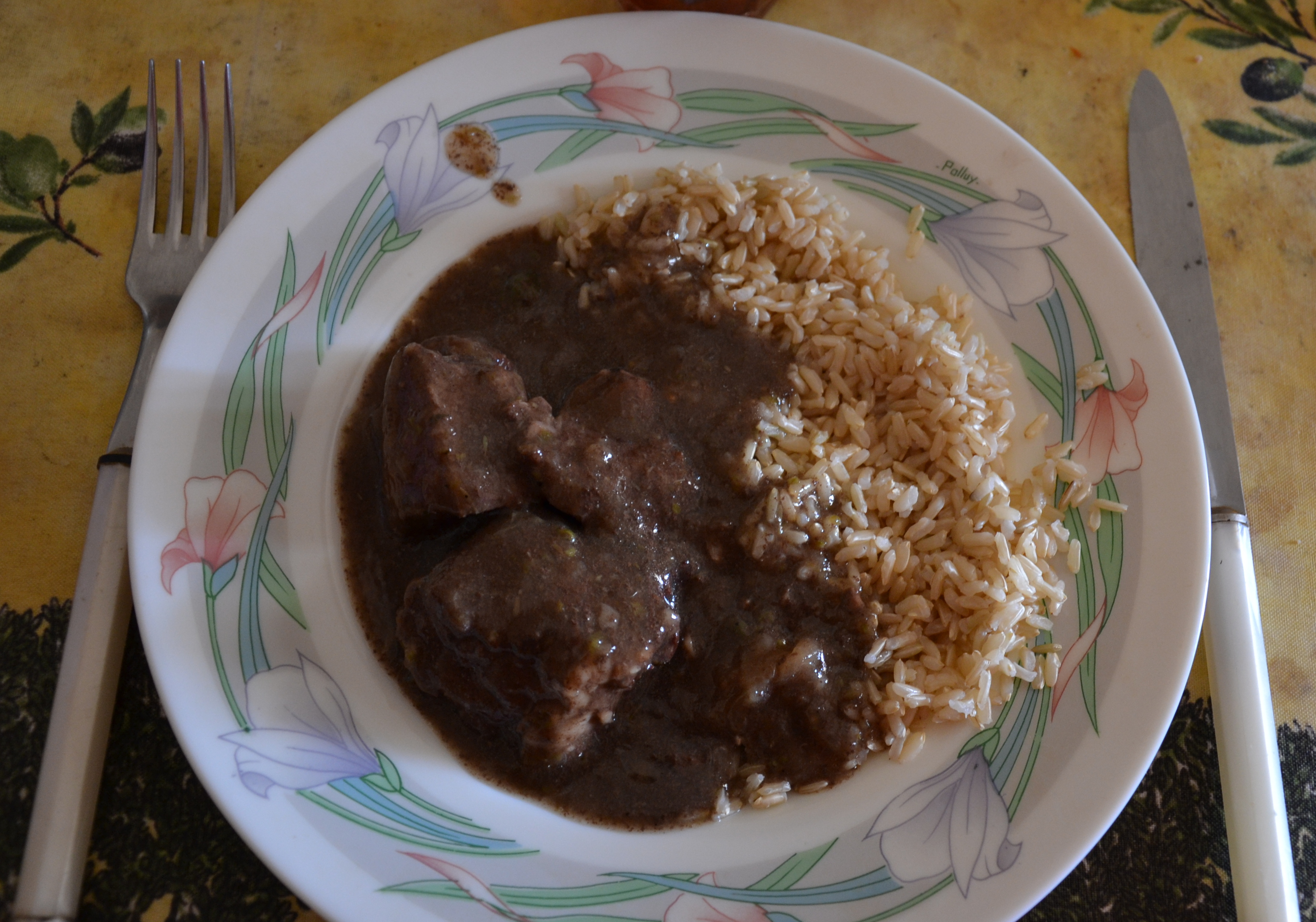 plat camarguais Fricot de Barque